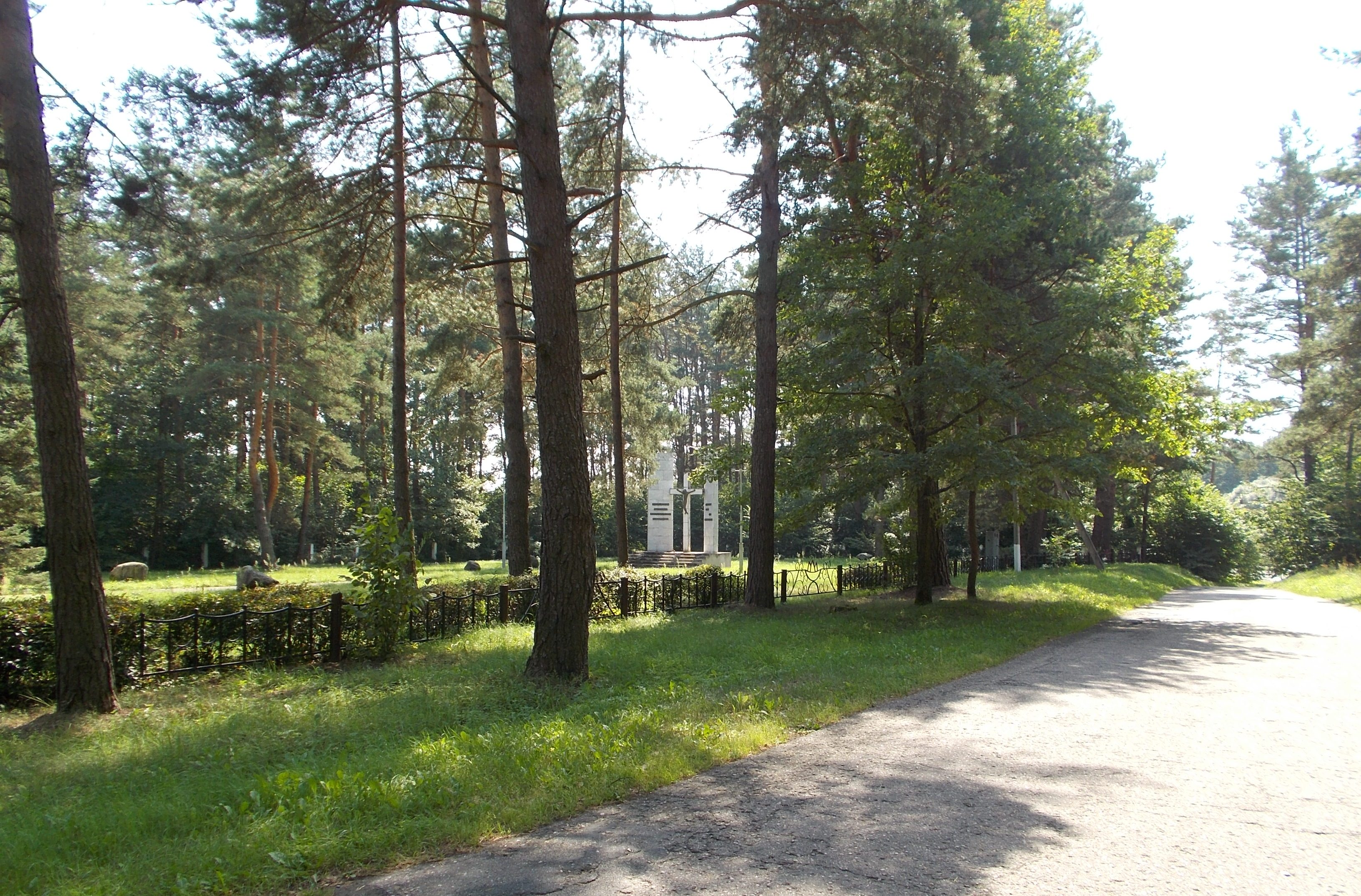 Мемориальный комплекс на месте захоронения жертв лагеря смерти.